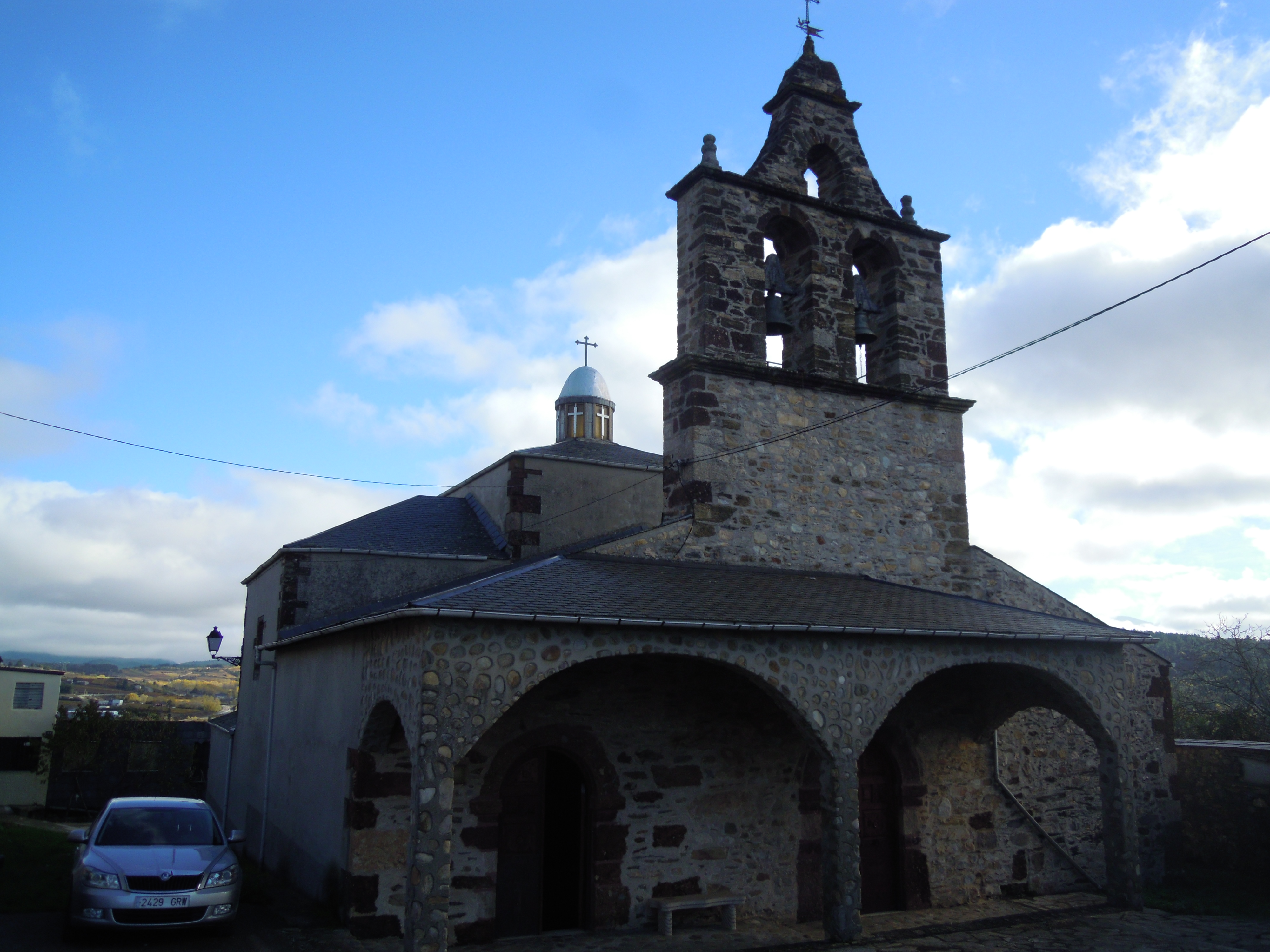 Igrexa parroquial de Vilanova de Valdeorras (O Barco de Valdeorras)